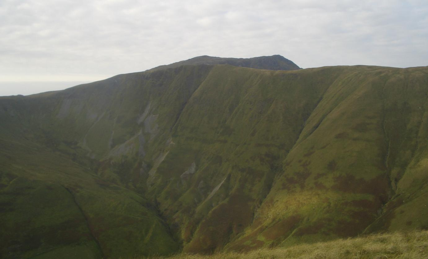 Pen yr allt uchaf view